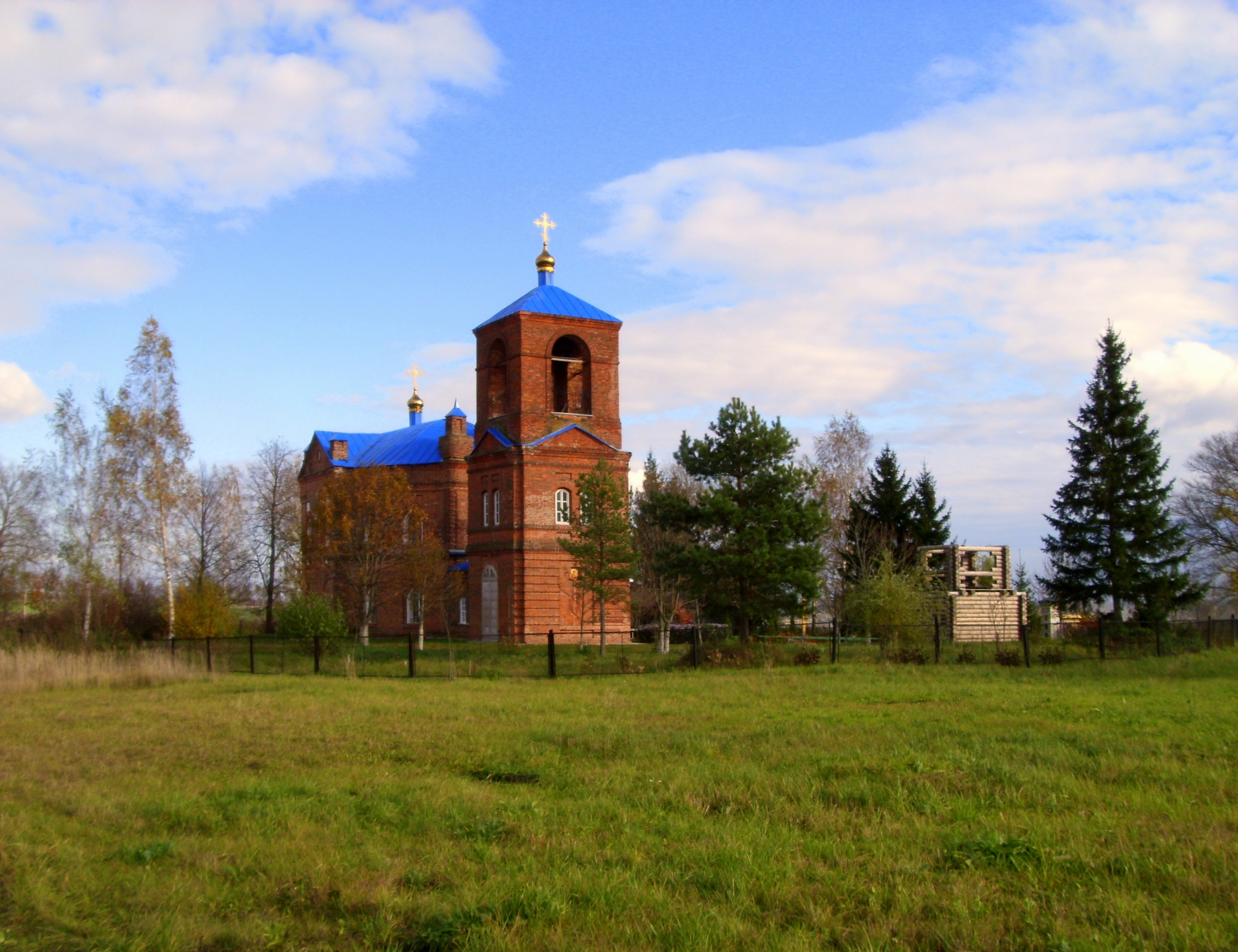 Церковь Преображения (Брянская область, Брянск, село Товарищичи)